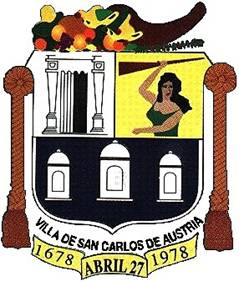 Escudo de armas de San Carlos